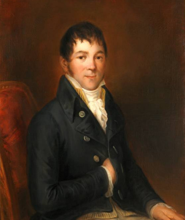 Oleo de José Ribelles y Helip: Retrato de Isidoro Maiquez, actor español, hacia 1795-1802.